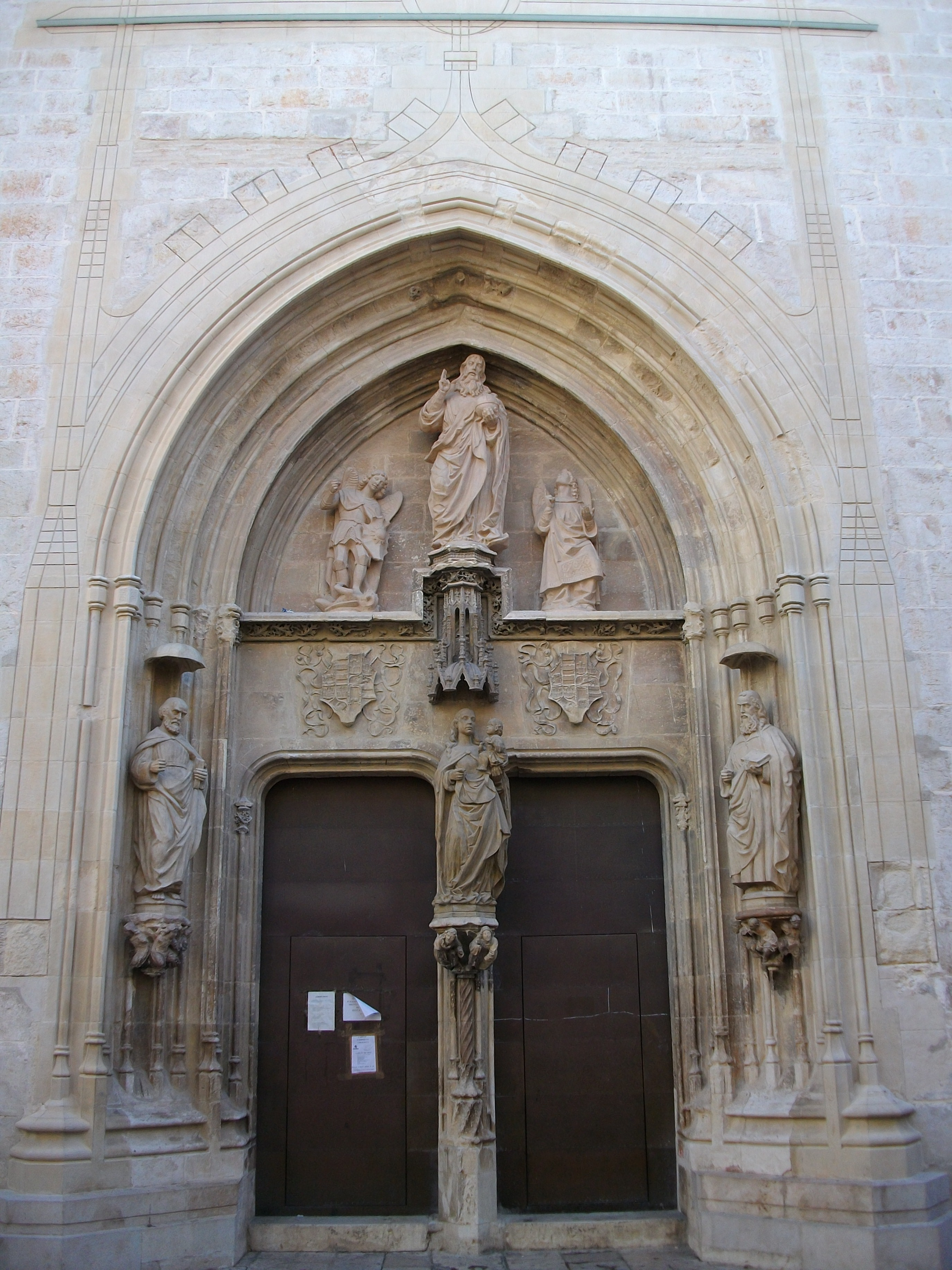 Porta dels Apòstols de la col·legiata de Gandia, la Safor, País Valencià.